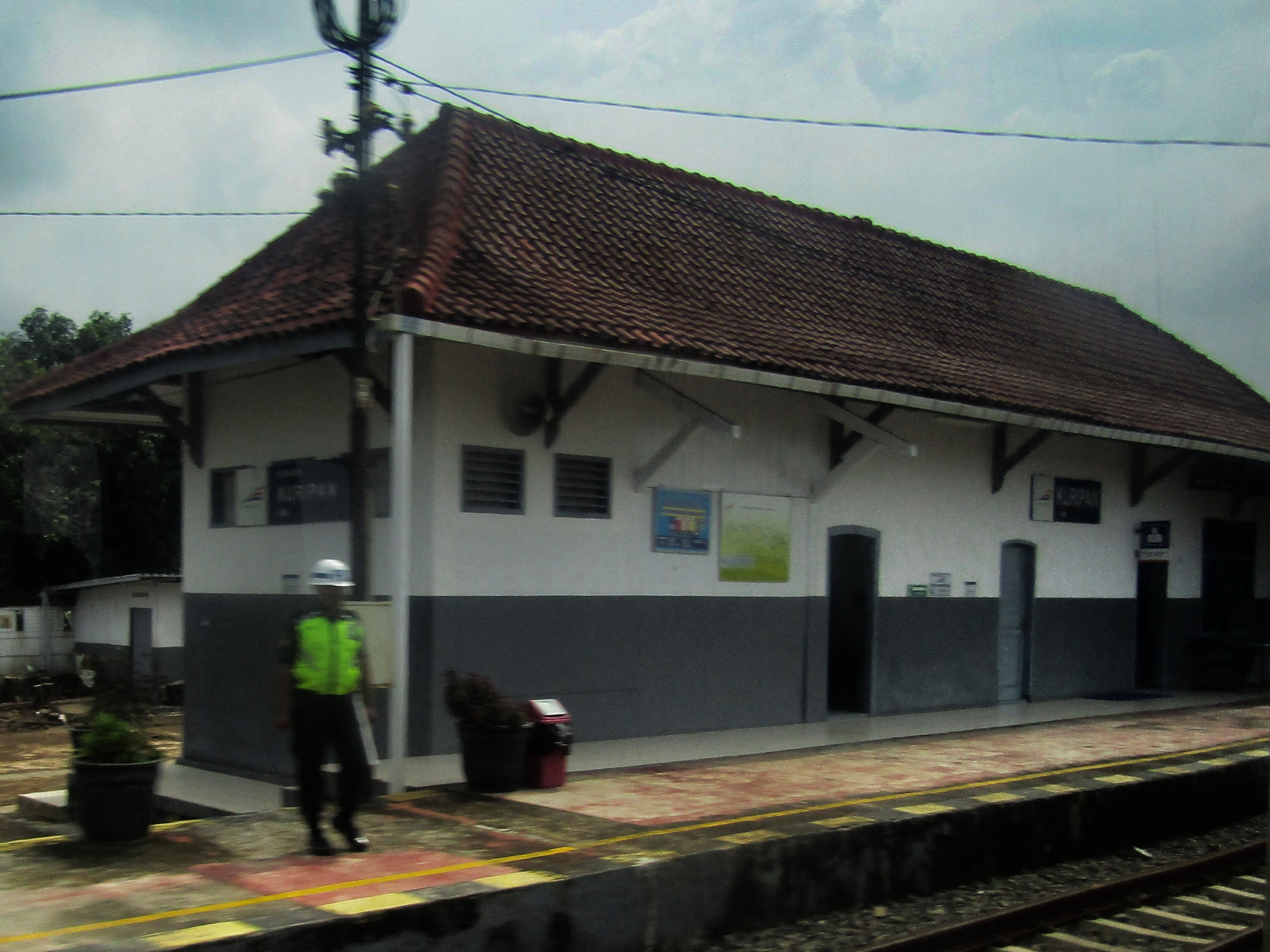 Stasiun Kuripan, 2019